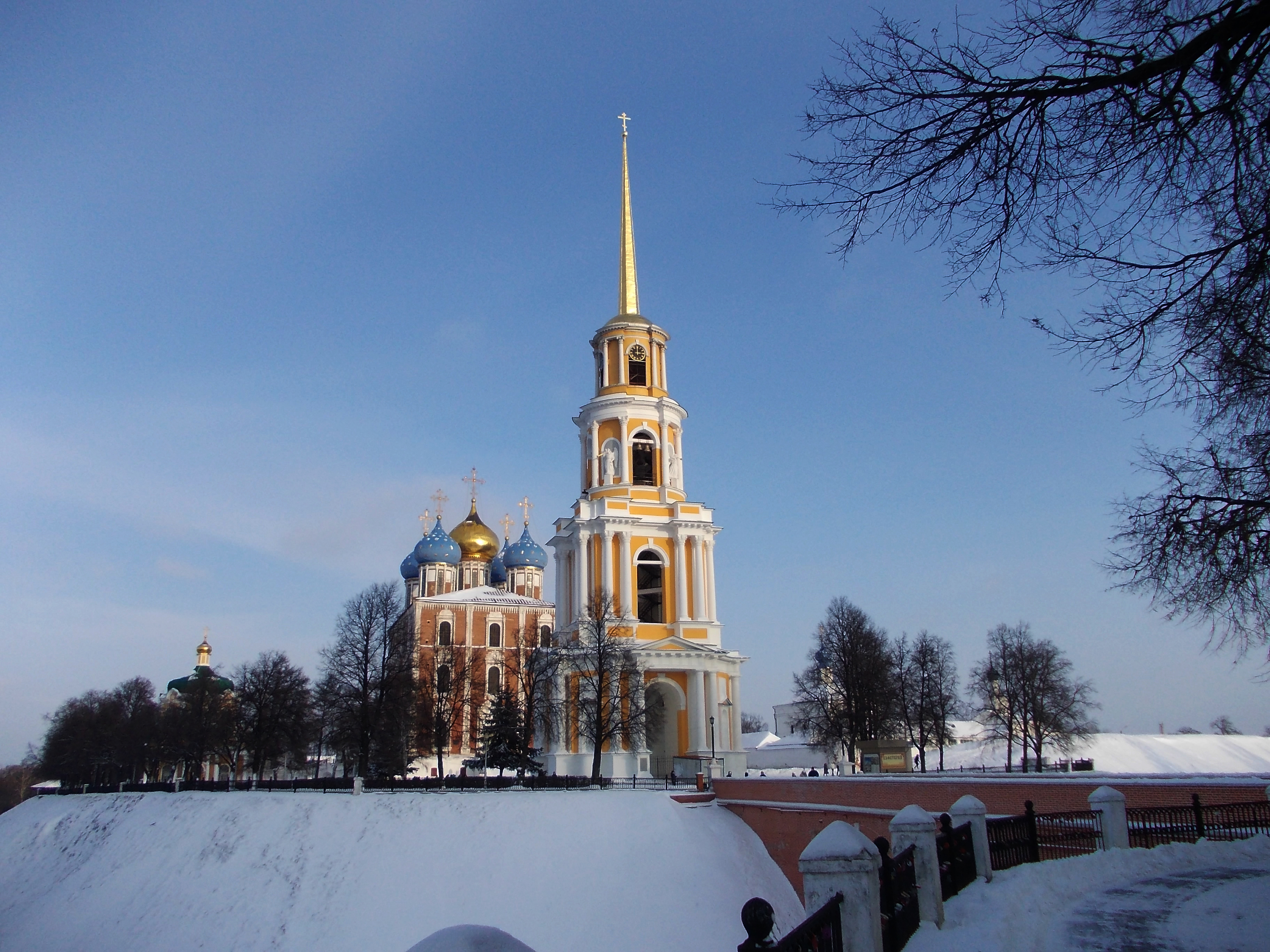 Рязань зимой.